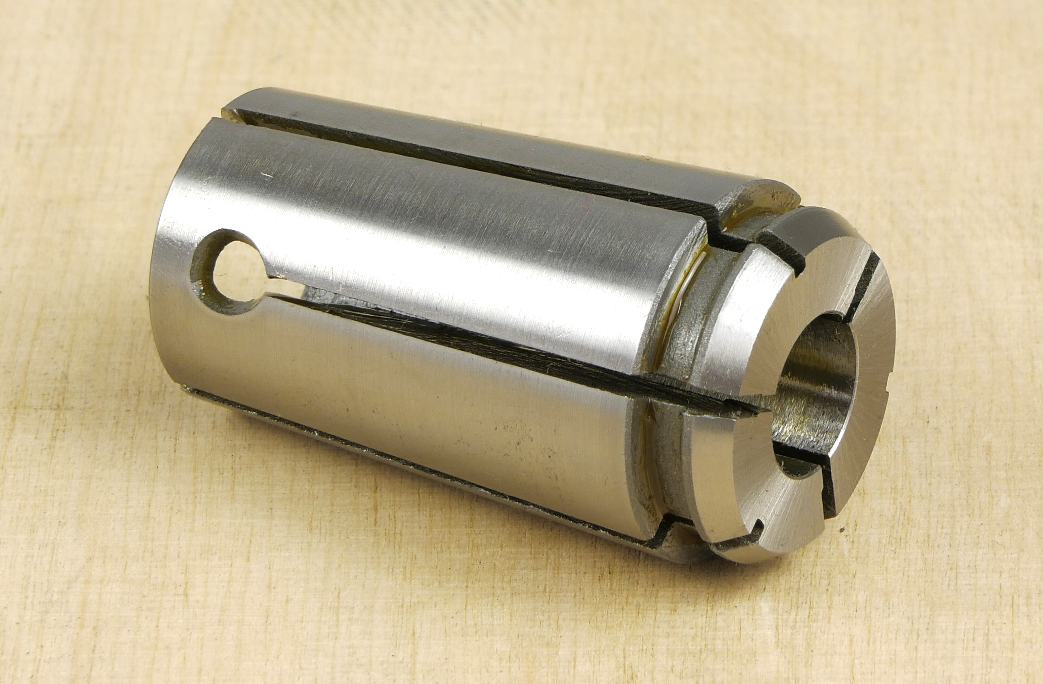 Tulejki PTEz stosowane w Polsce przed standardem tulejek ER